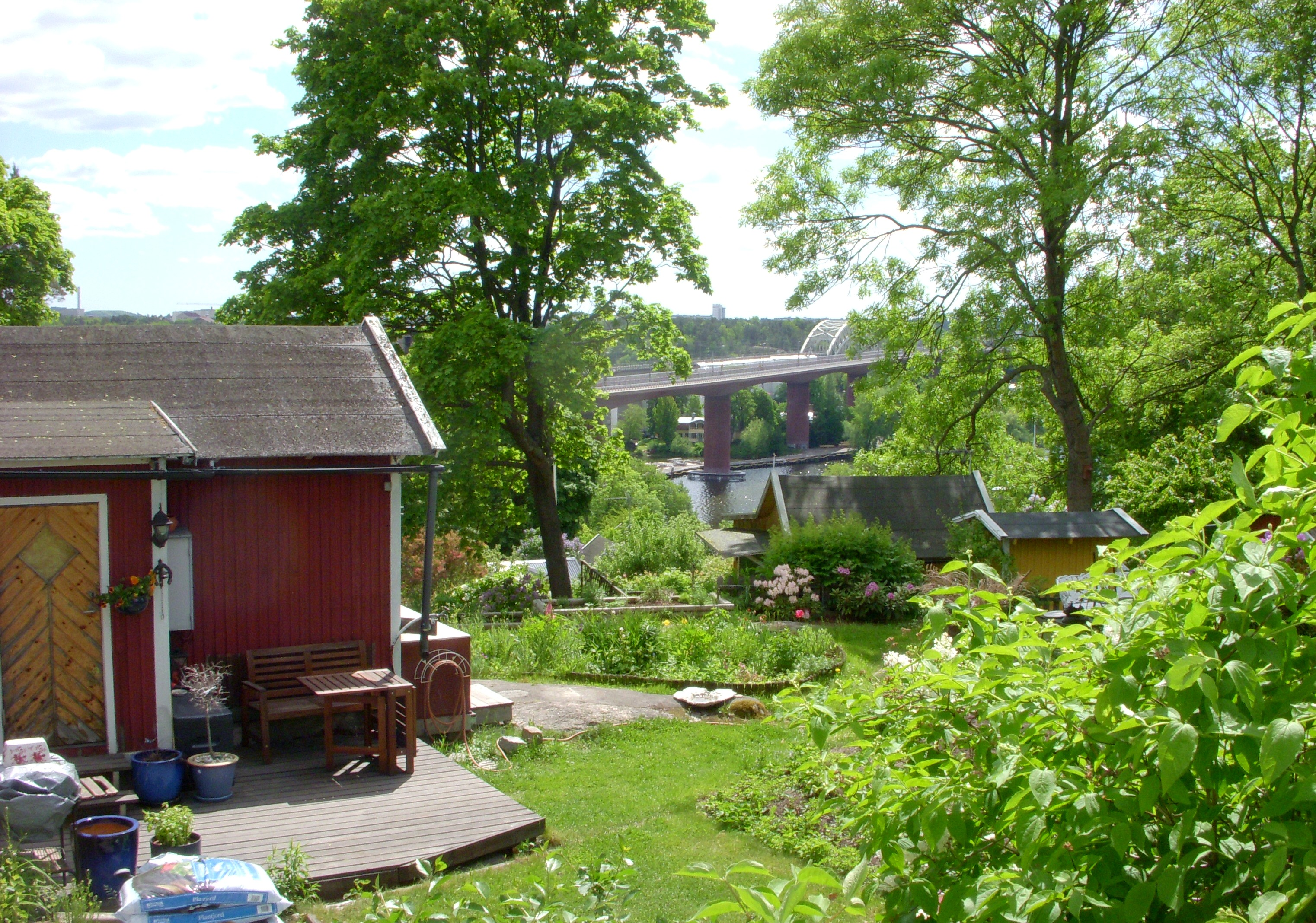 Tantolundens koloniträdgårdar, Södermalm, Stockholm, Årstabron i bakgrunden